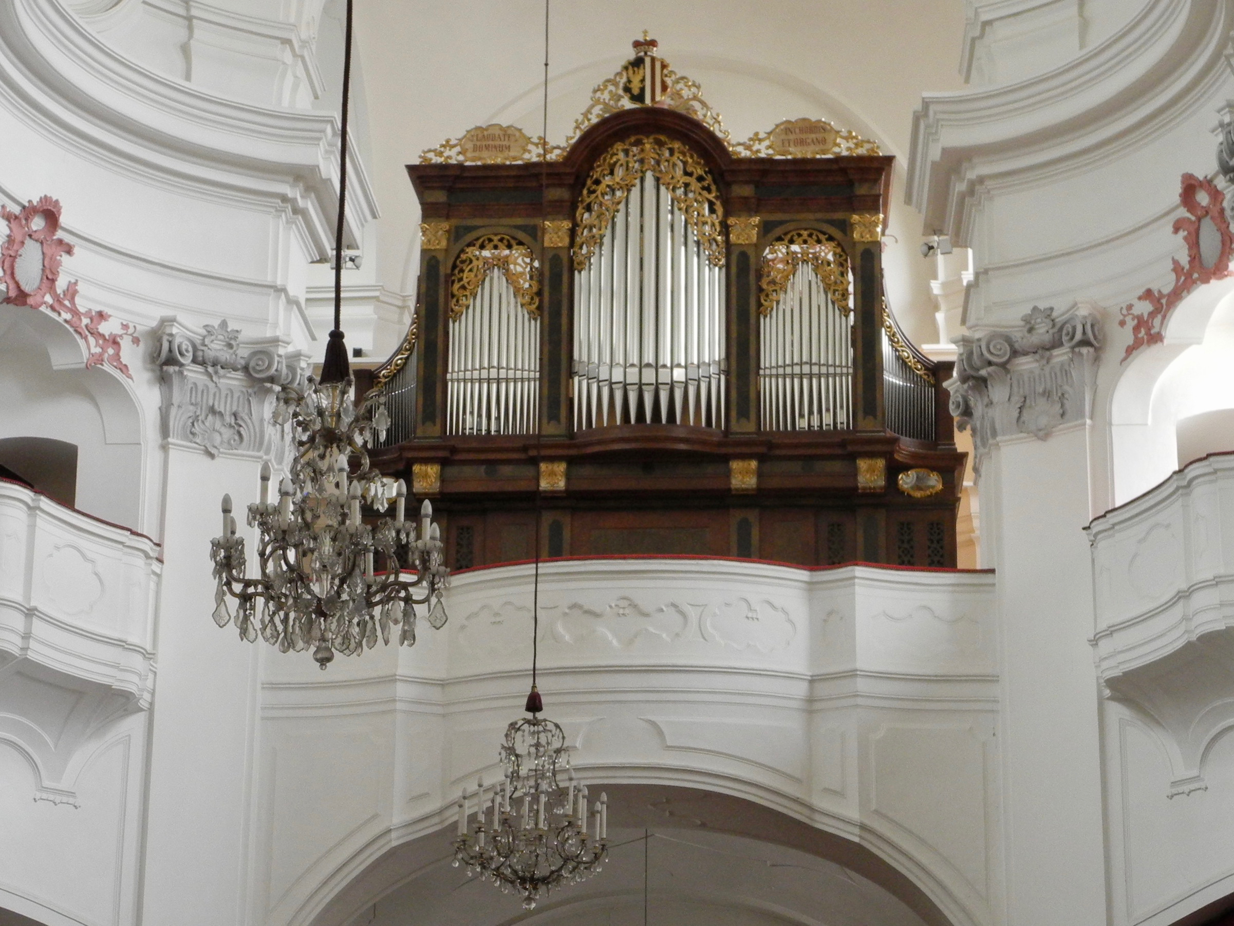 Neubau im historischen Gehäuse